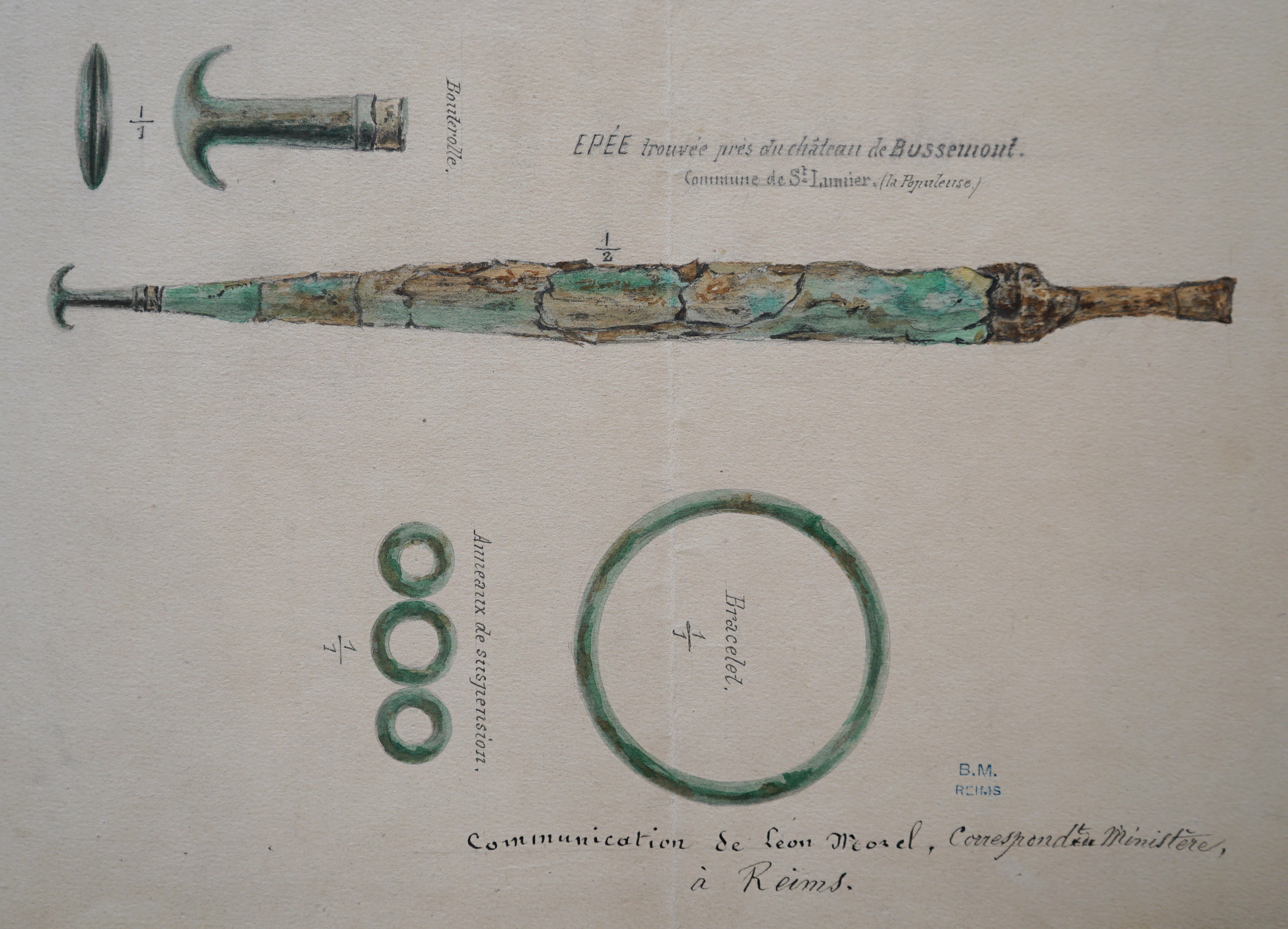 retour sur le fouilles de Morel par des dessins de Gastebois.